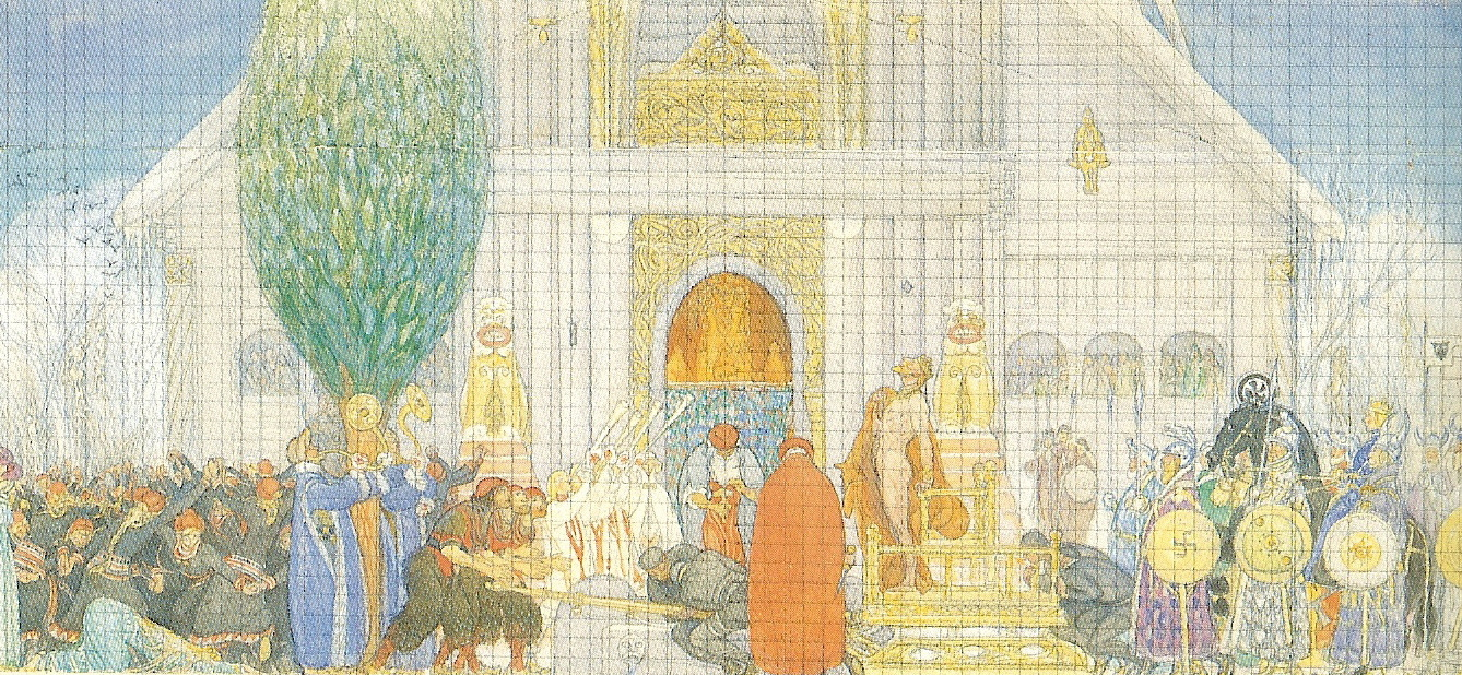 sketch